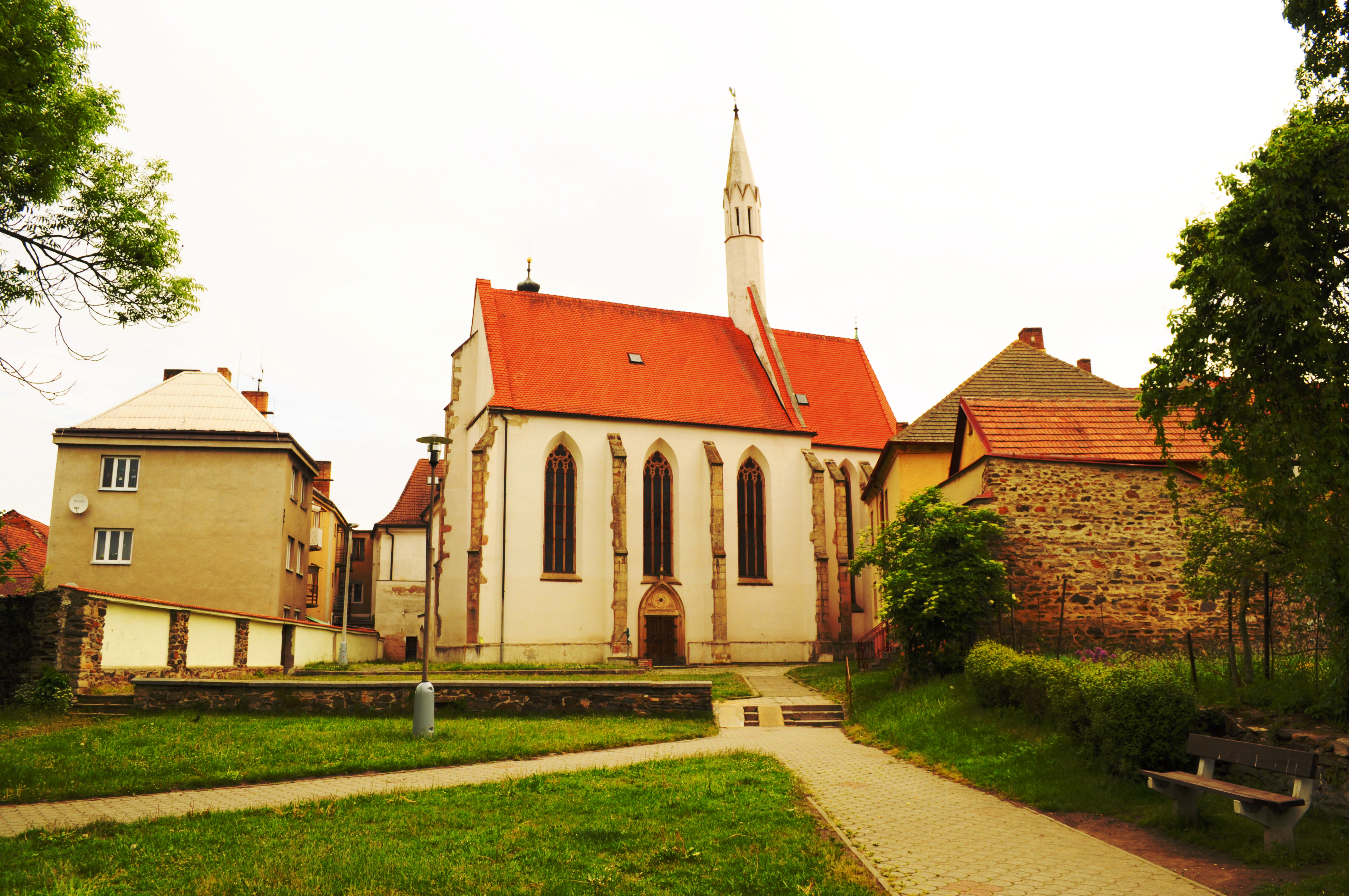 Jižní pohled od potoka na kostel sv. Víta, celá situace ze Soběslavi.